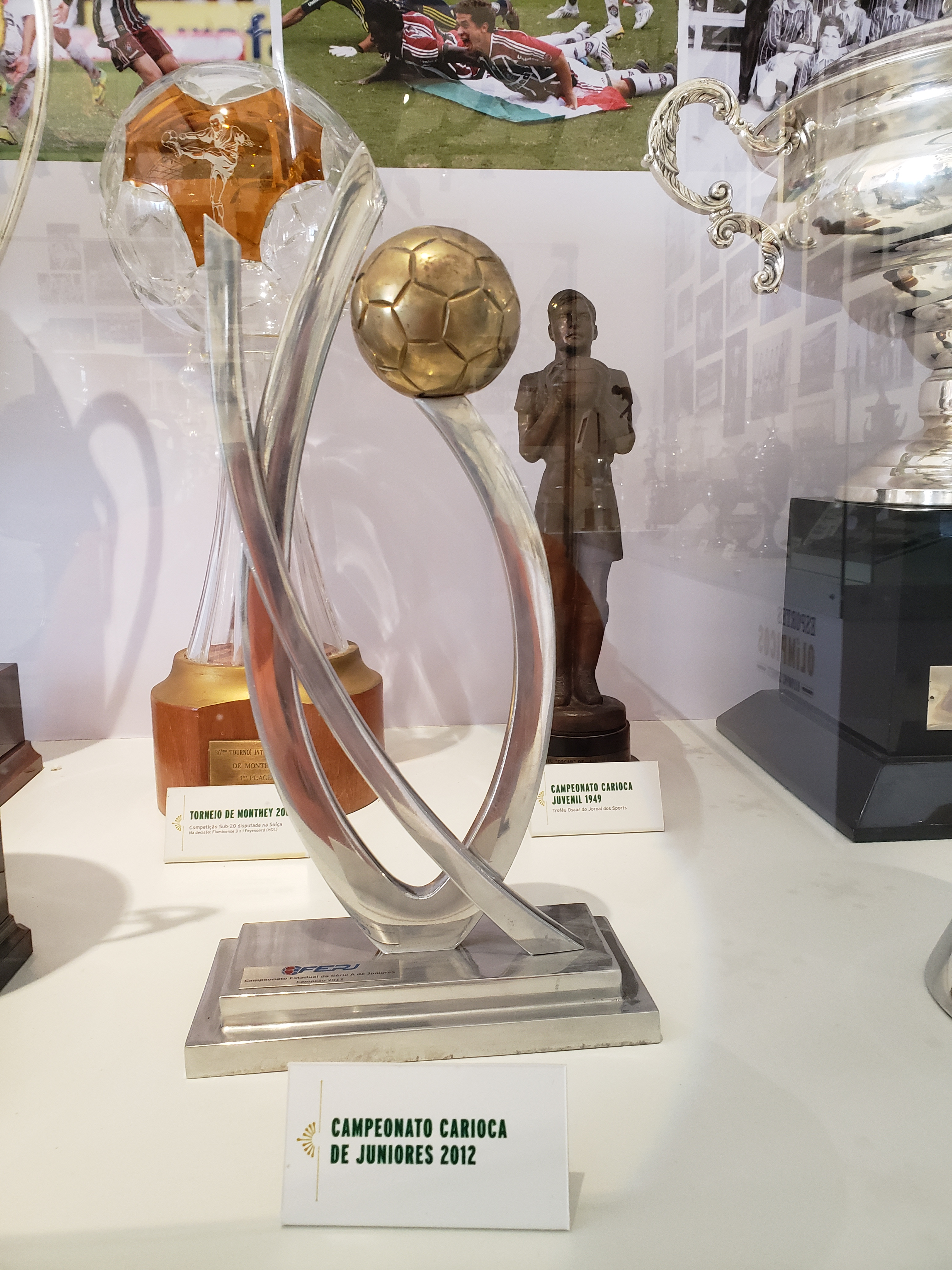 Taça do Campeonato Carioca de Juniores de Futebol de 2012 conquistado pelo Fluminense Football Club.